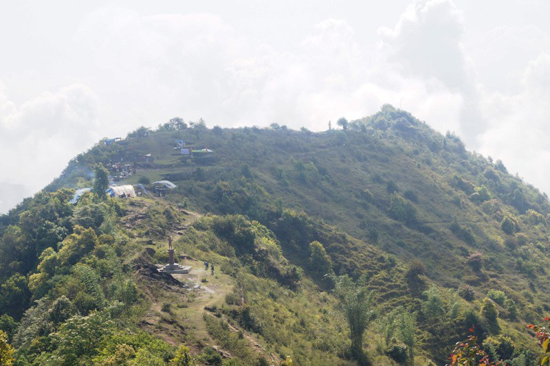 नेपाली: आदिम किरात तयामा, खियामा र रैछाकुलेको प्रतिमा हलेसीस्थित तुवाचुङडाडाँमा